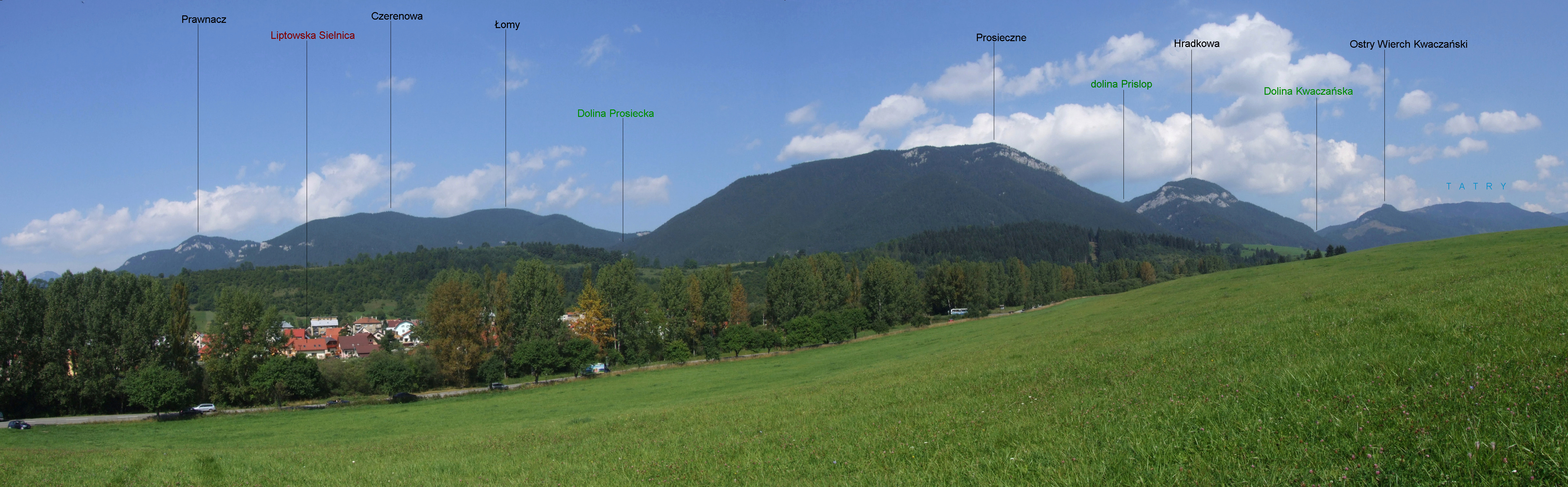 Widok z pól nad Liptowskimi Matiaszowcami